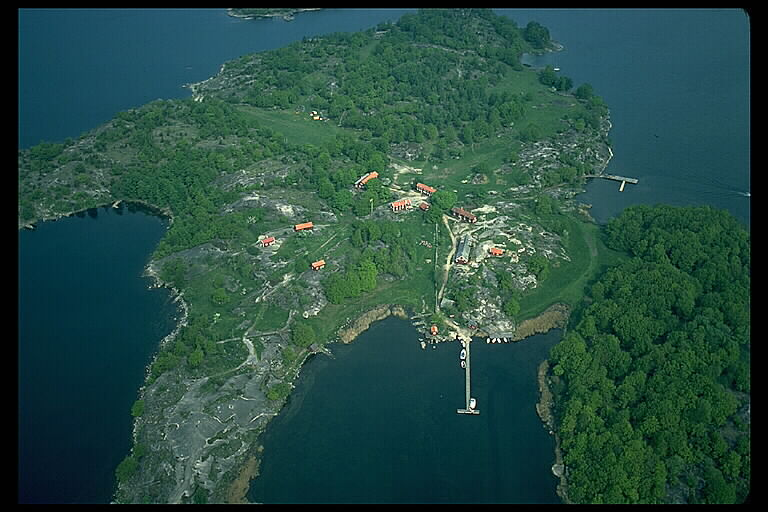 Flygbild över ön. Bilden troligen från omkring 1970. Motiv: Tjärö Nyckelord: Flygbilder, Naturreservat, Riksintressen Kategori: Kust- och skärgårdsmiljö, Naturreservat Flygbild över ön. Bilden troligen från omkring 1970.